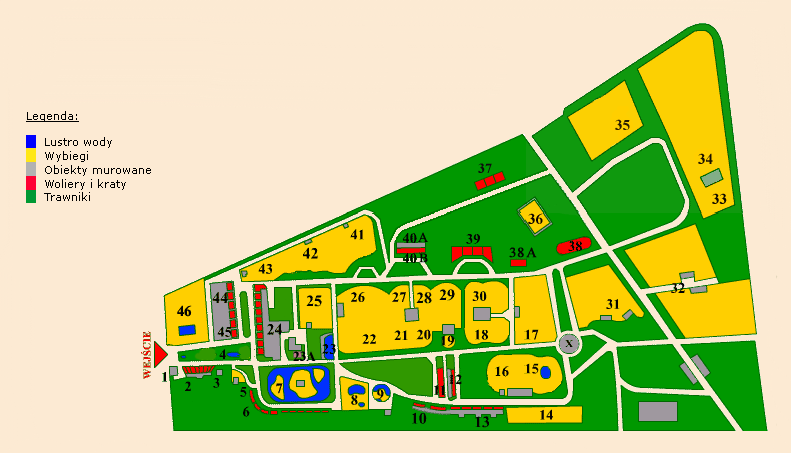 План Краківського зоопарку